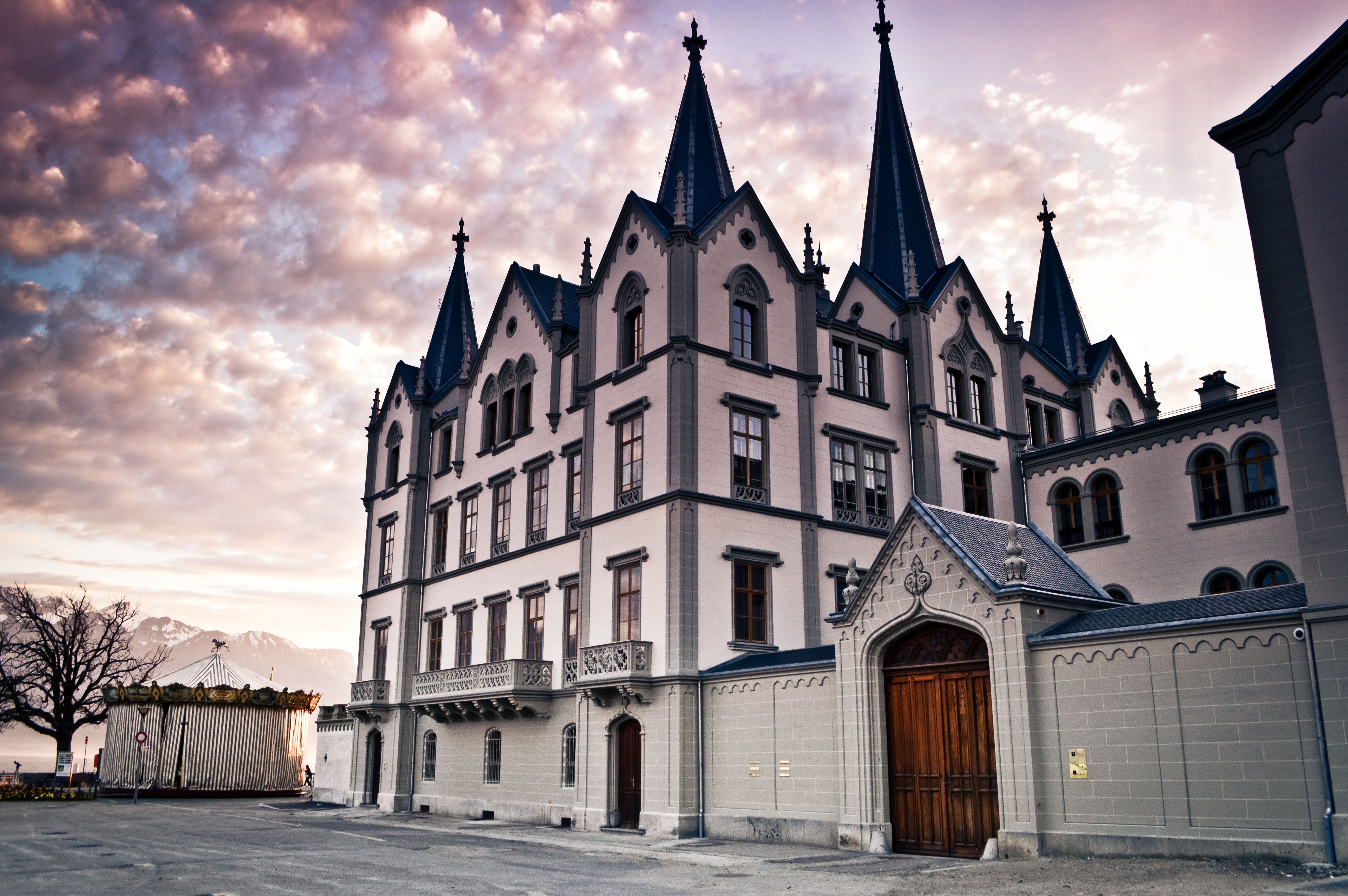 Le château de l'Aile, Vevey